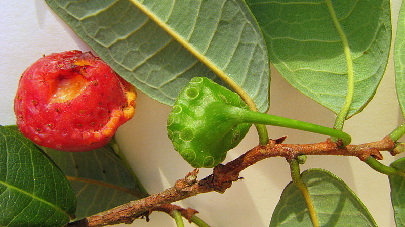 Brosimum guianense (Aubl.) Huber